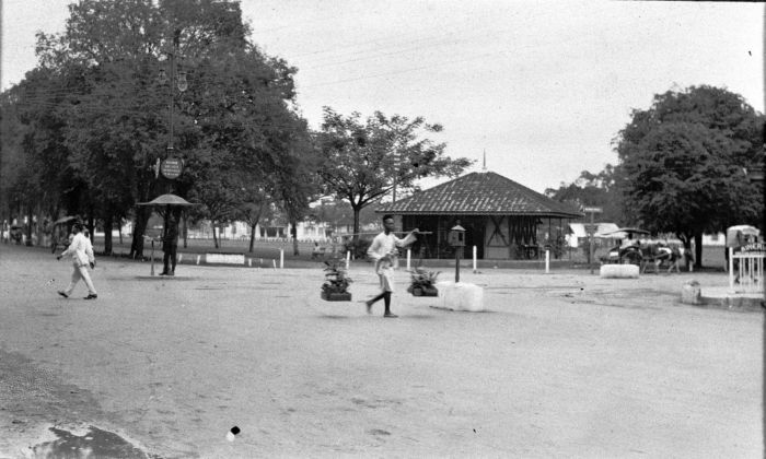 Foto. De foto is genomen bij het kruispunt tussen de Kesawan, de Cremerweg, de Nienhuysweg en de Huttenbachstraat in Medan.. Gezicht vanaf de Kesawan op de Esplanade